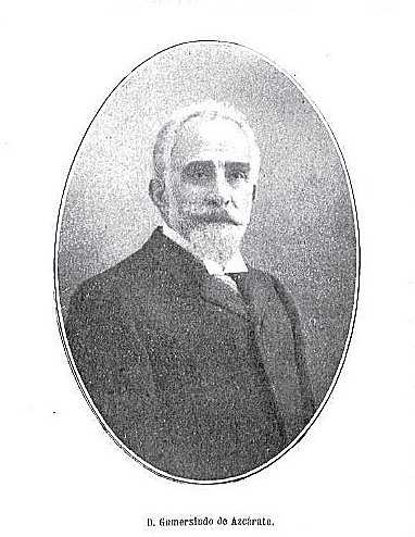 Gumersindo de Azcarate (1840-1917)